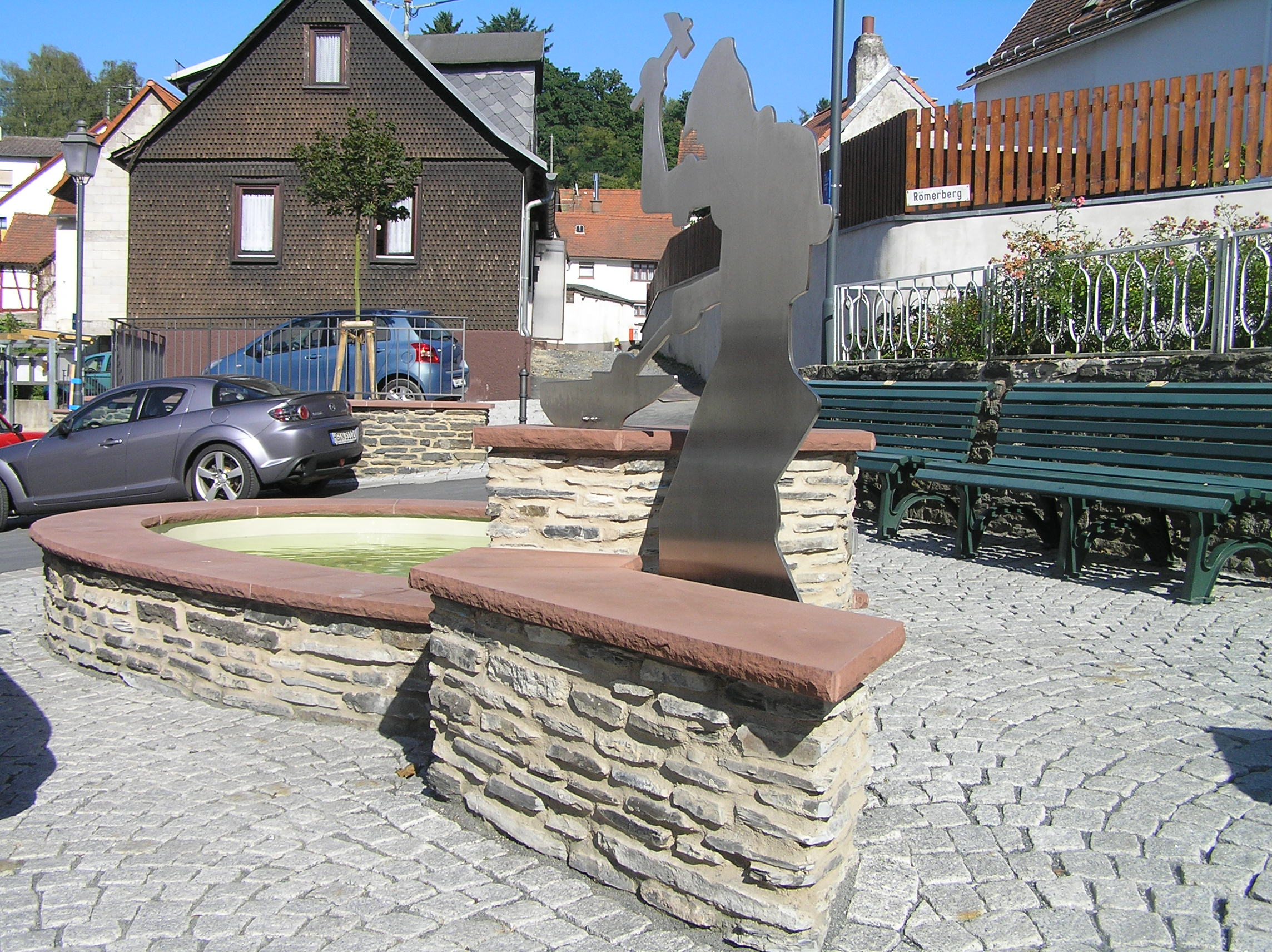 Skulptur eines Schmiedes am Dorfbrunnen in Arnoldshain, Schmitten, Deutschland, gegenüber dem alten Rathaus.